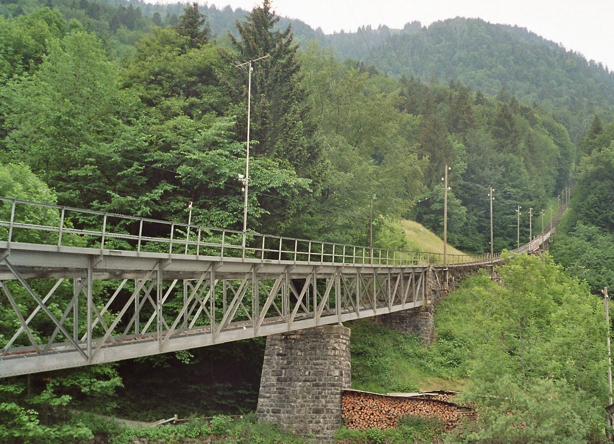 Die Niesenbahn unterhalb der Station Mülenen in der Schweiz